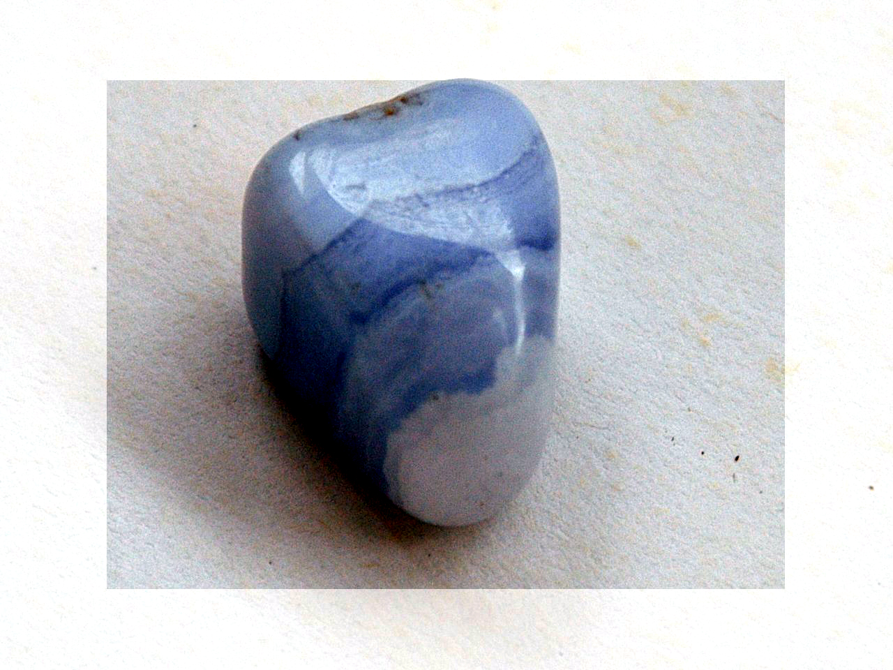 Chalcedon